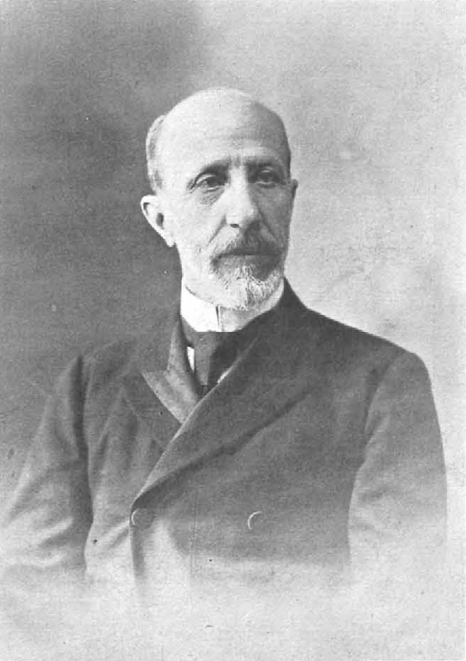 Excmo. Sr. D. José Ferrándiz, contraalmirante de la Armada, nuevo Ministro de Marina, en la revista La Ilustración Española y Americana.